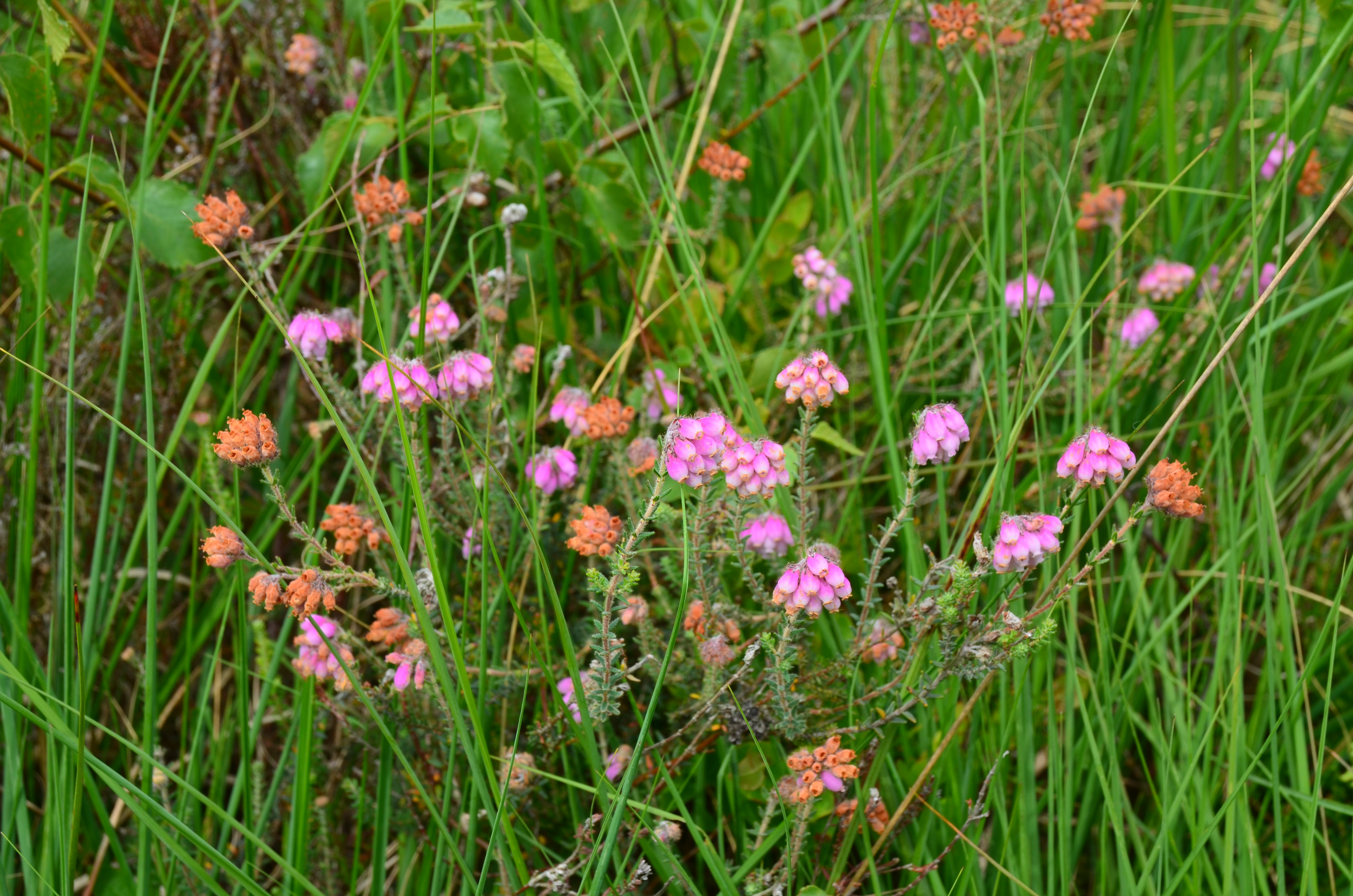 Glocken-Heide im Naturschutzgebiet Hohes Moor in Oldendorf, Landkreis Stade